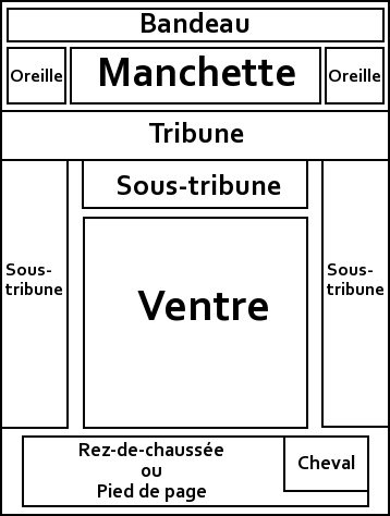 Dénomination en français des zones composant la une d'un journal